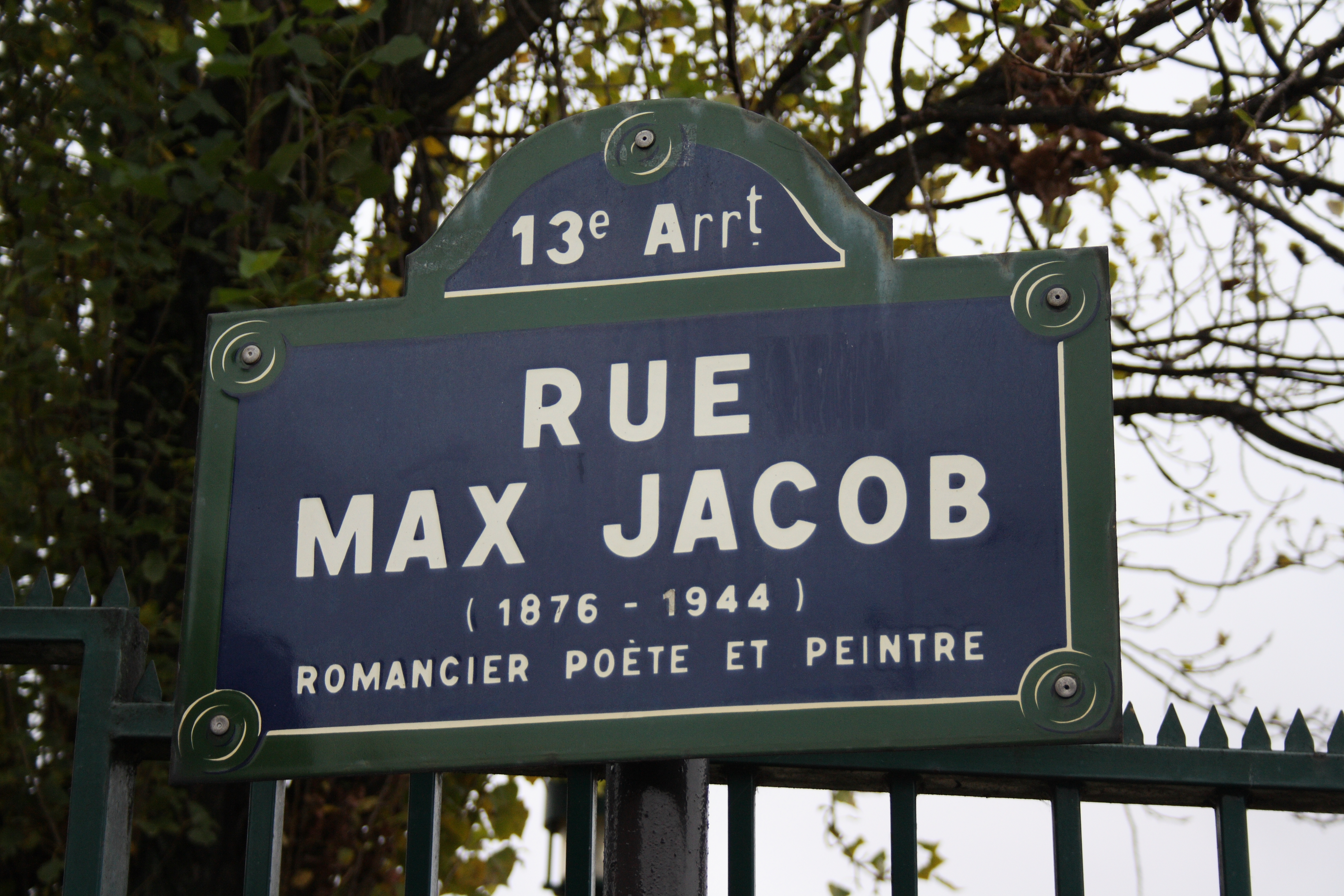 Straßenschild Rue Max-Jacob in Paris (13. Arrondissement)